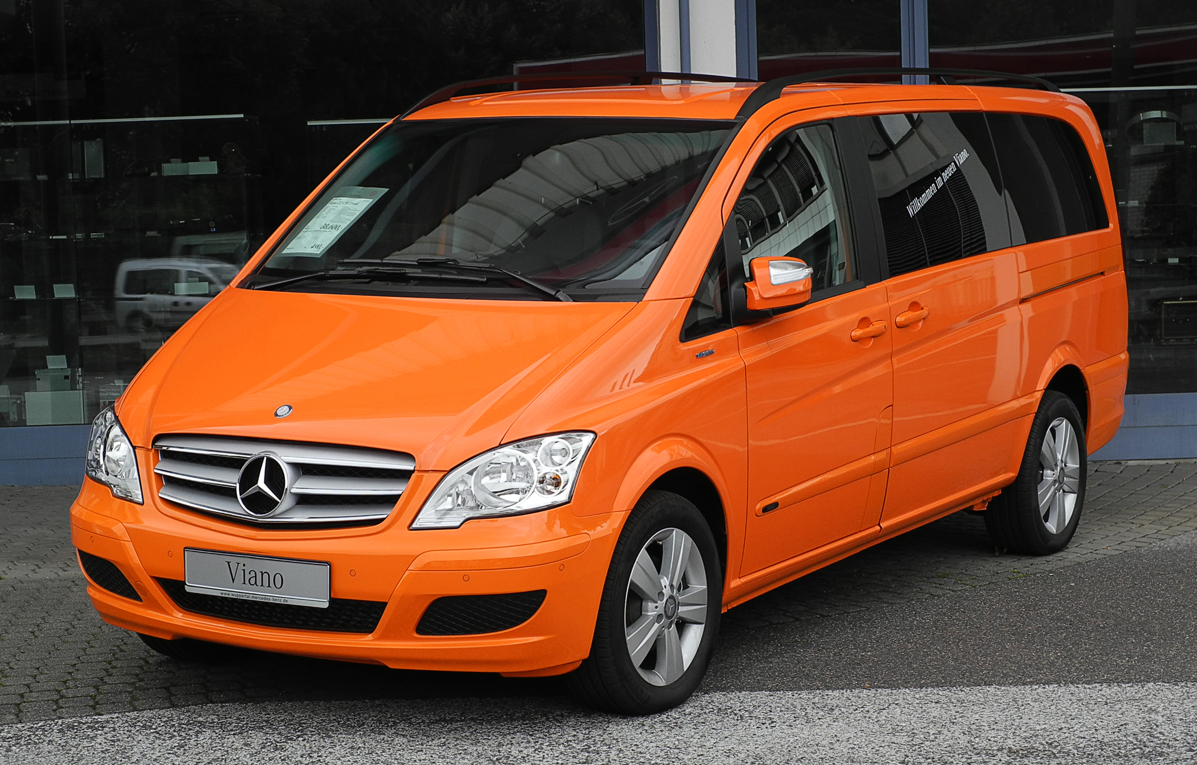 Mercedes-Benz Viano Lang CDI 2.2 BlueEFFICIENCY Trend (V 639, Facelift)